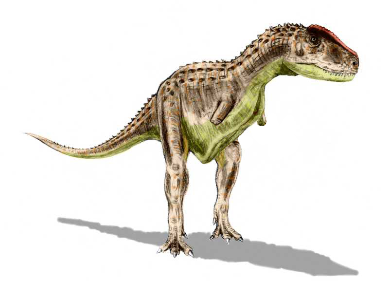 Rugops primus, pencil drawing